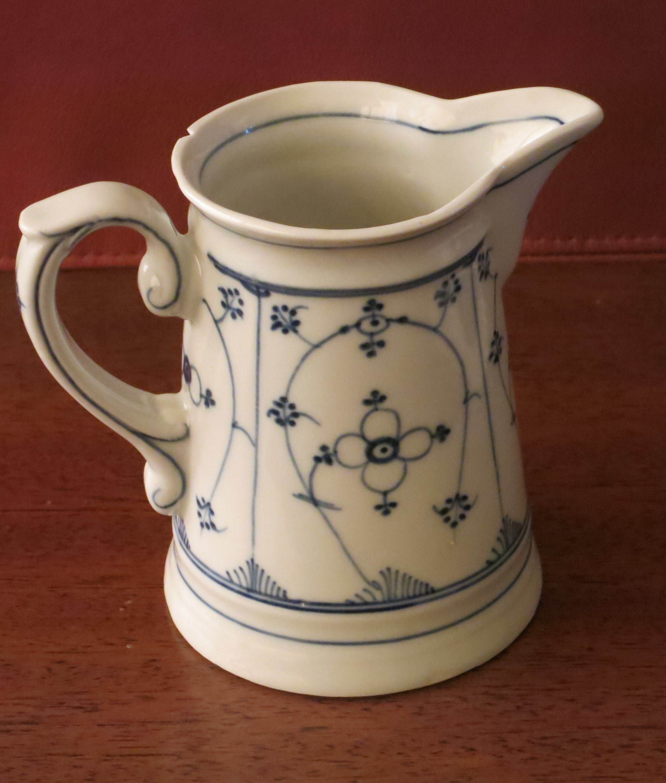 Milchkännchen der Porzellanfabrik Rauenstein vor 1900